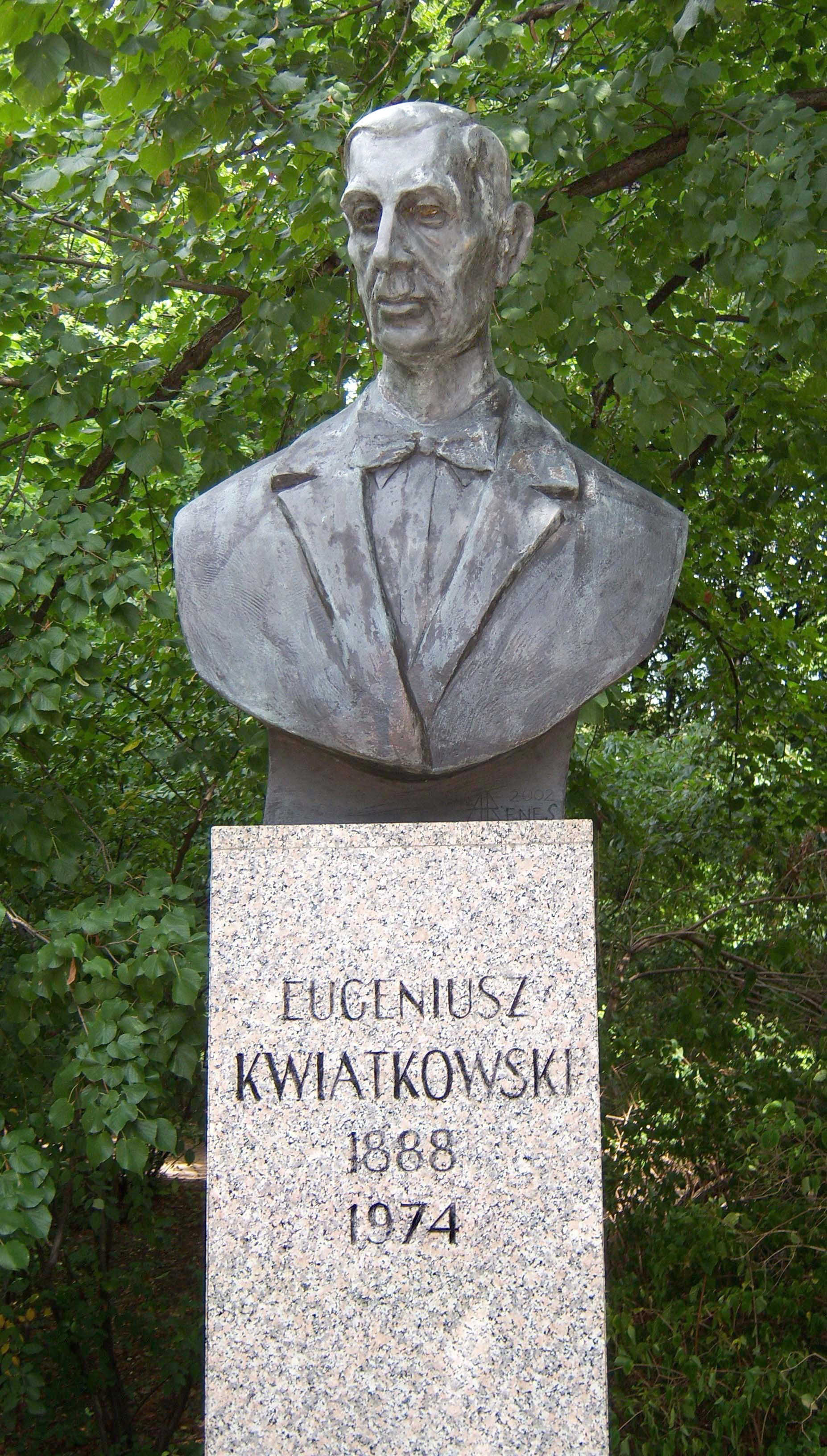 Popiersie Eugeniusza Kwiatkowskiego w Łazienkach Królewskich w Warszawie